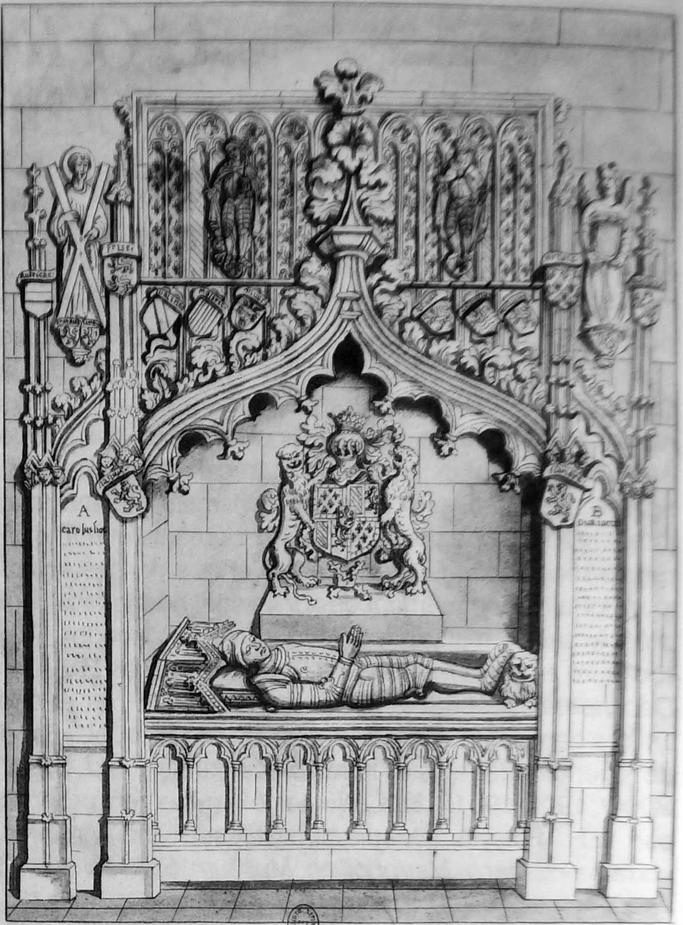 Jean Crocq realize ce tombeau Gravure du cabinet des estampes de la BNF.